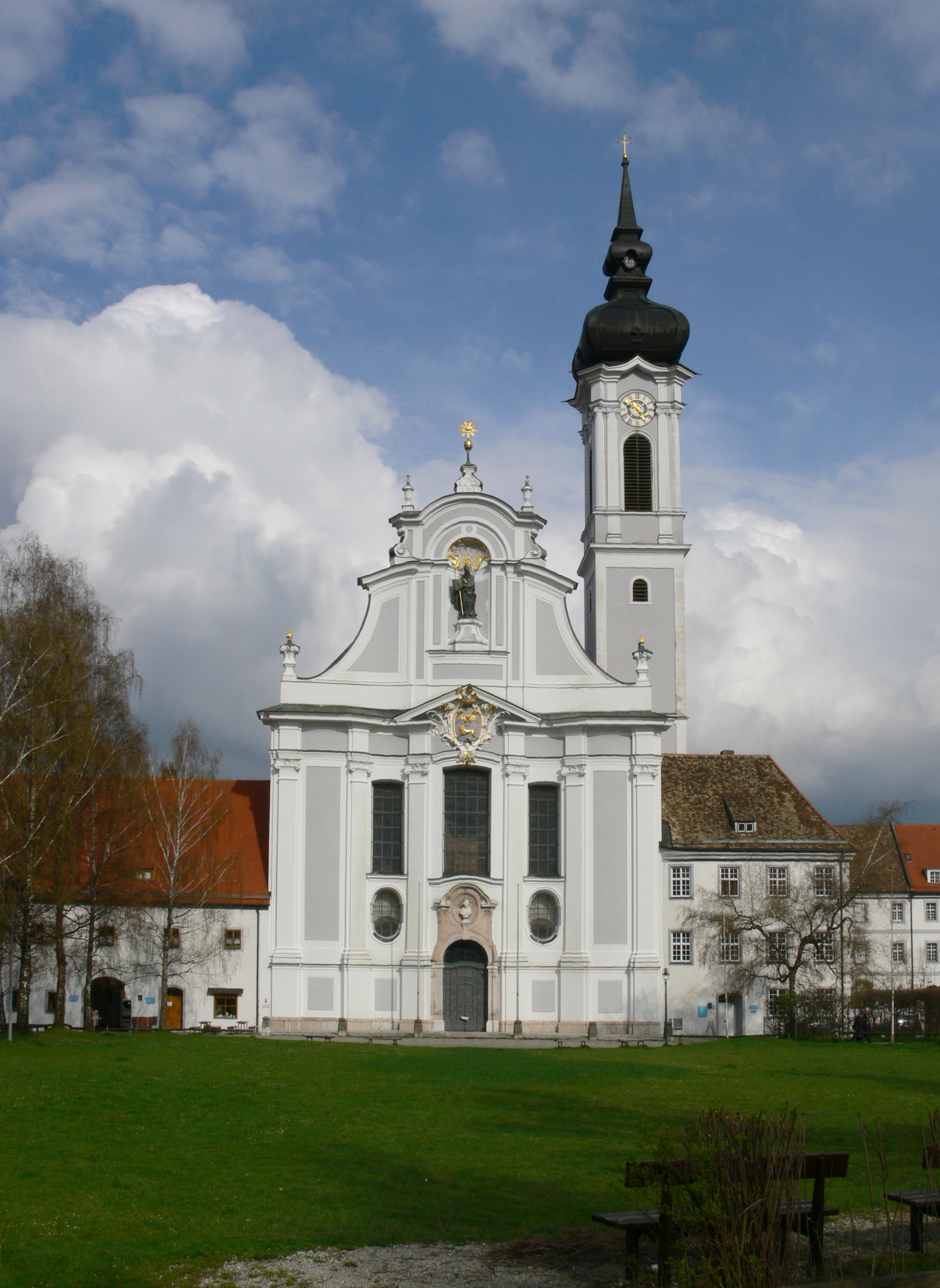 Ehem. Augustiner-Chorherrenstift Dießen mit der Westfassade des Marienmünsters von Johann Michael Fischer; links im Bild der ehem. Marstall.